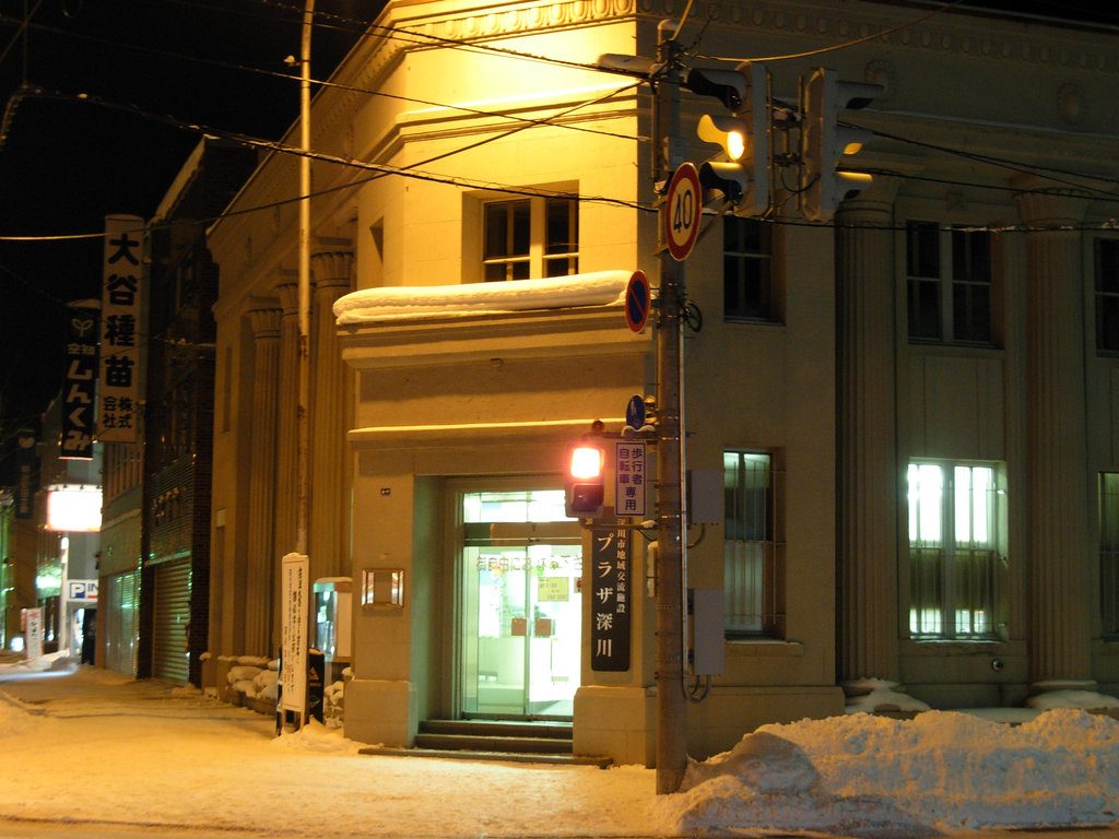 Plaza Fukagawa (Old Hokkaido Takushoku Bank Fukagawa office). This also used as bus waiting room (see "Fukagawa jujigai(Japanese)"). プラザ深川（「深川十字街」バス待合所を兼ねる、旧北海道拓殖銀行深川支店）